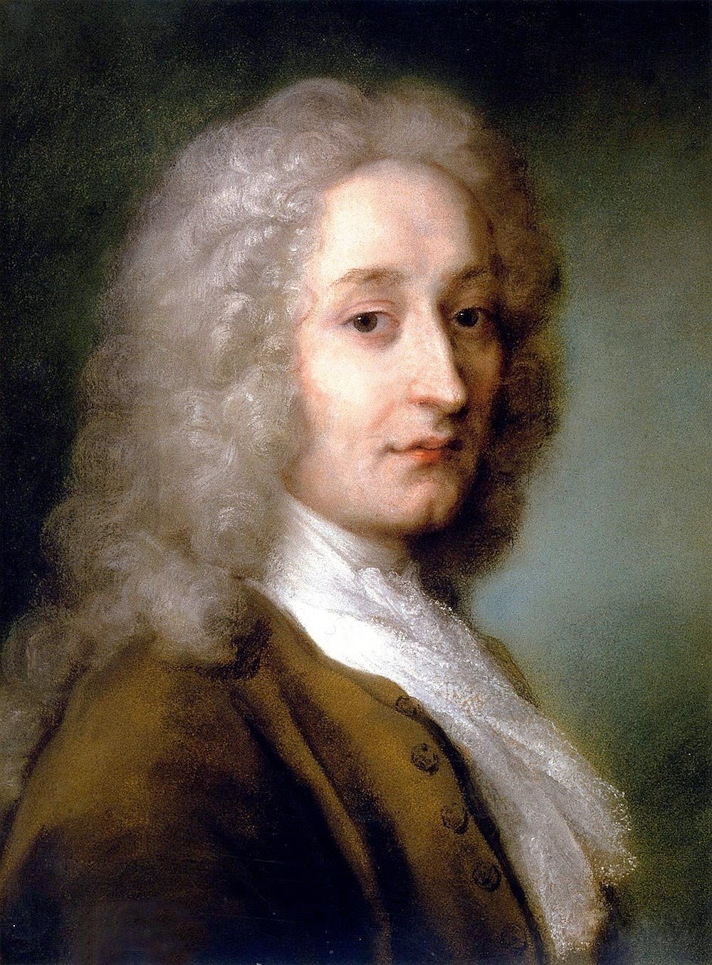 Портрет Антуана Ватто, виконаний Карр'єра Розалюбою